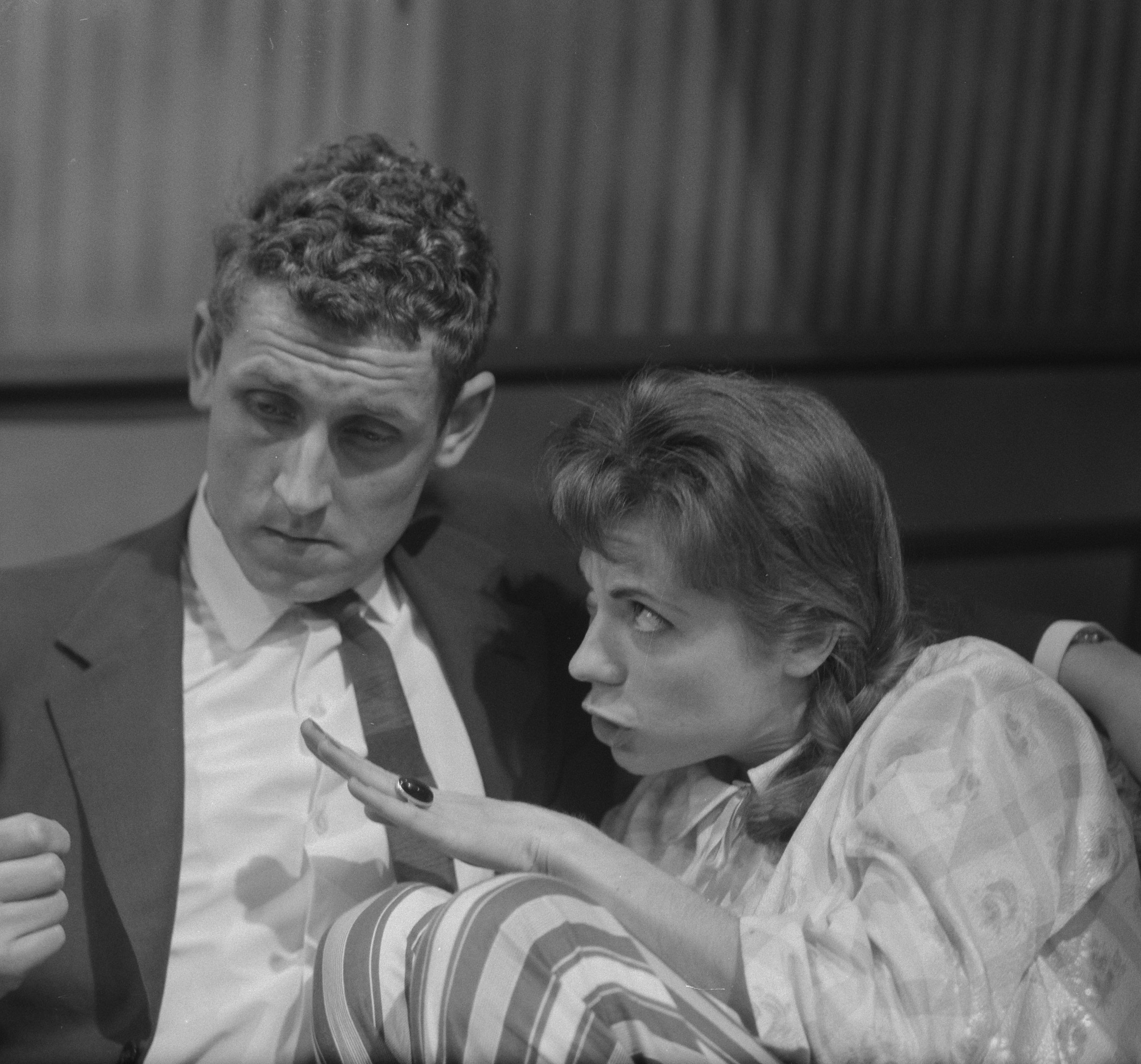 Televisiespel "Nooit Gedacht". John Lanting en Ingeborg Elzevier